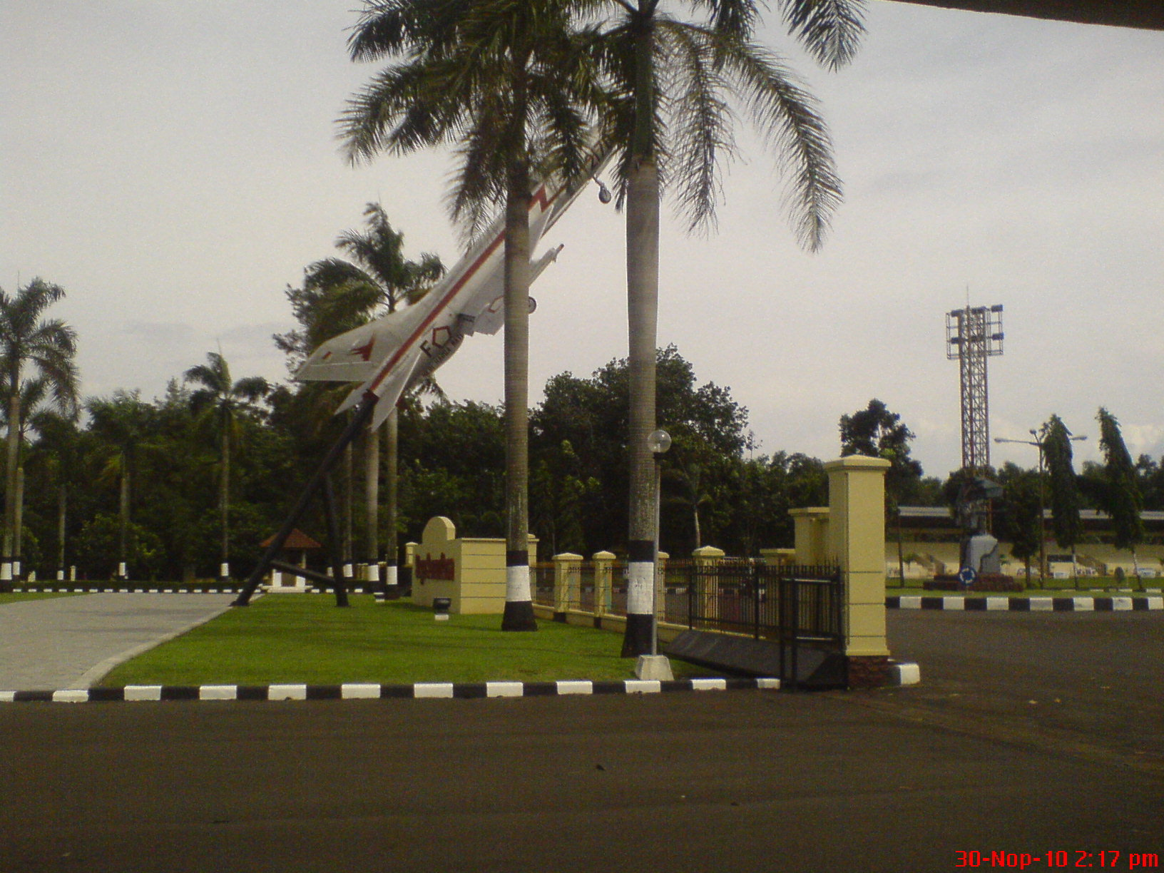 Patung Pesawat